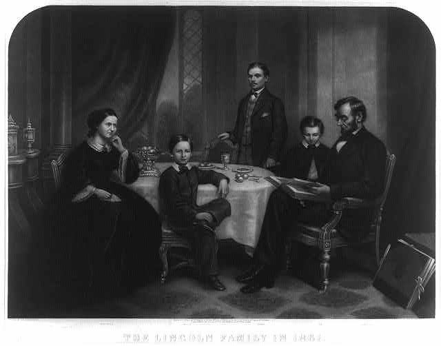 エイブラハム・リンカーンとその家族